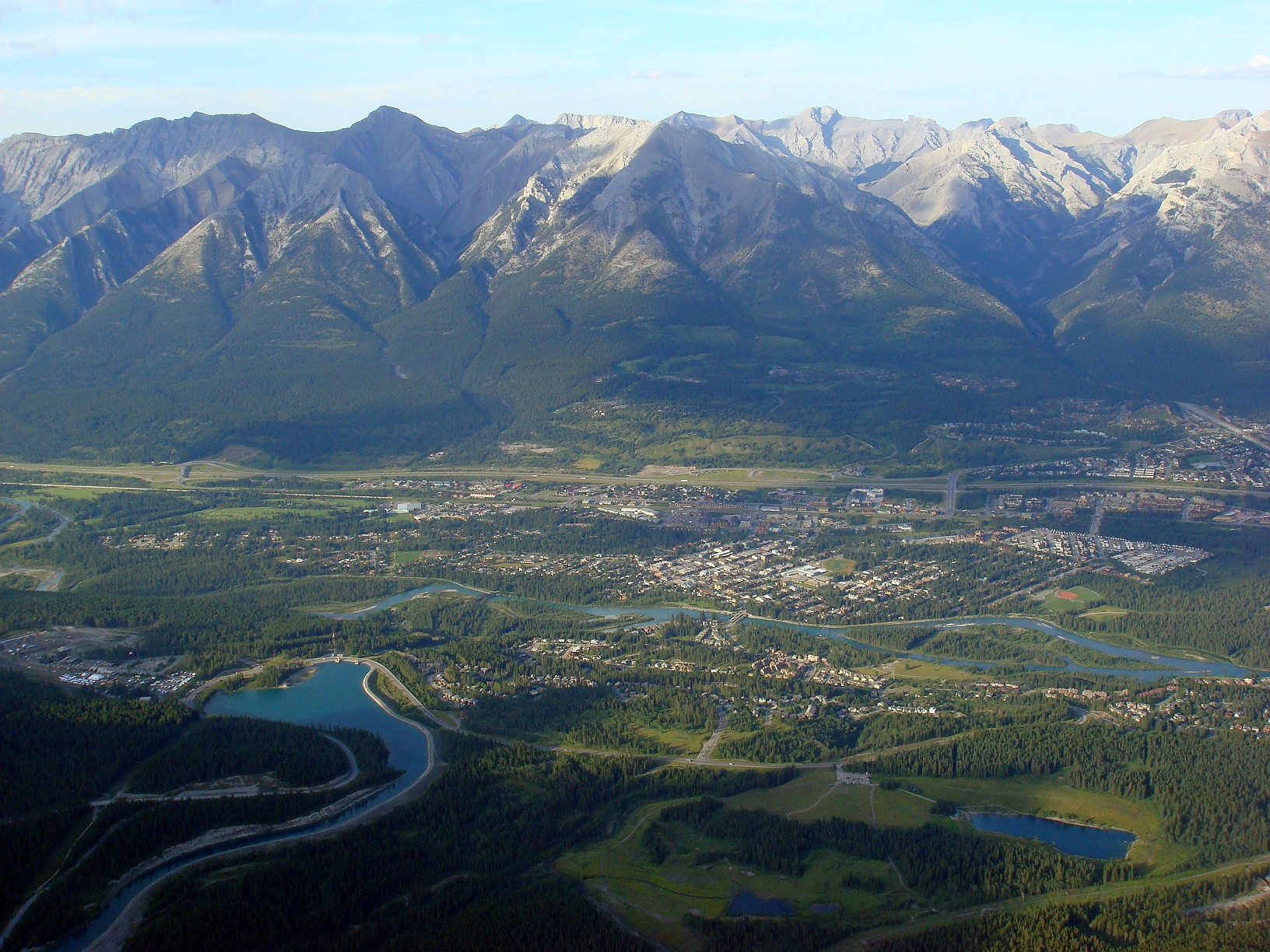 Une vue de la ville de Canmore du haut du Chinaman's Peak.